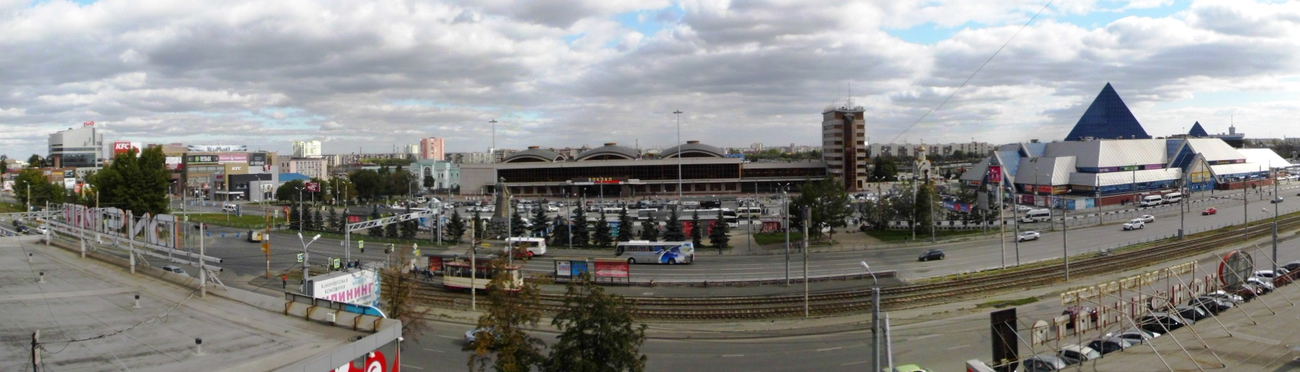 Привокзальная площадь города Челябинска, Здание железнодорожного вокзала: площадь Привокзальная, 1, Челябинск, Челябинская область. Гостиница вокзала (в правой части здания), проезжие части улицы Степана Разина, начало улицы Овчинникова, окончание улицы Свободы. На дальнем плане - Ленинский район города. Справа здание ТК "Синегорье".